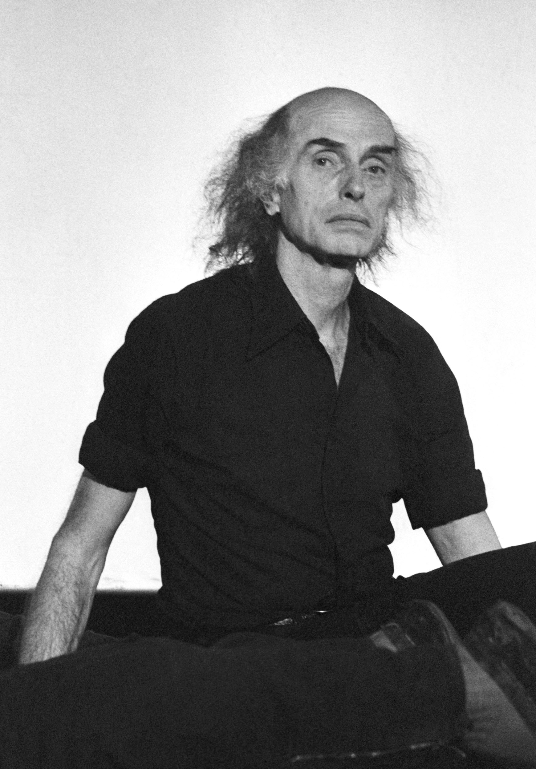 Julian Beck, fondatore del Living Theatre di New York